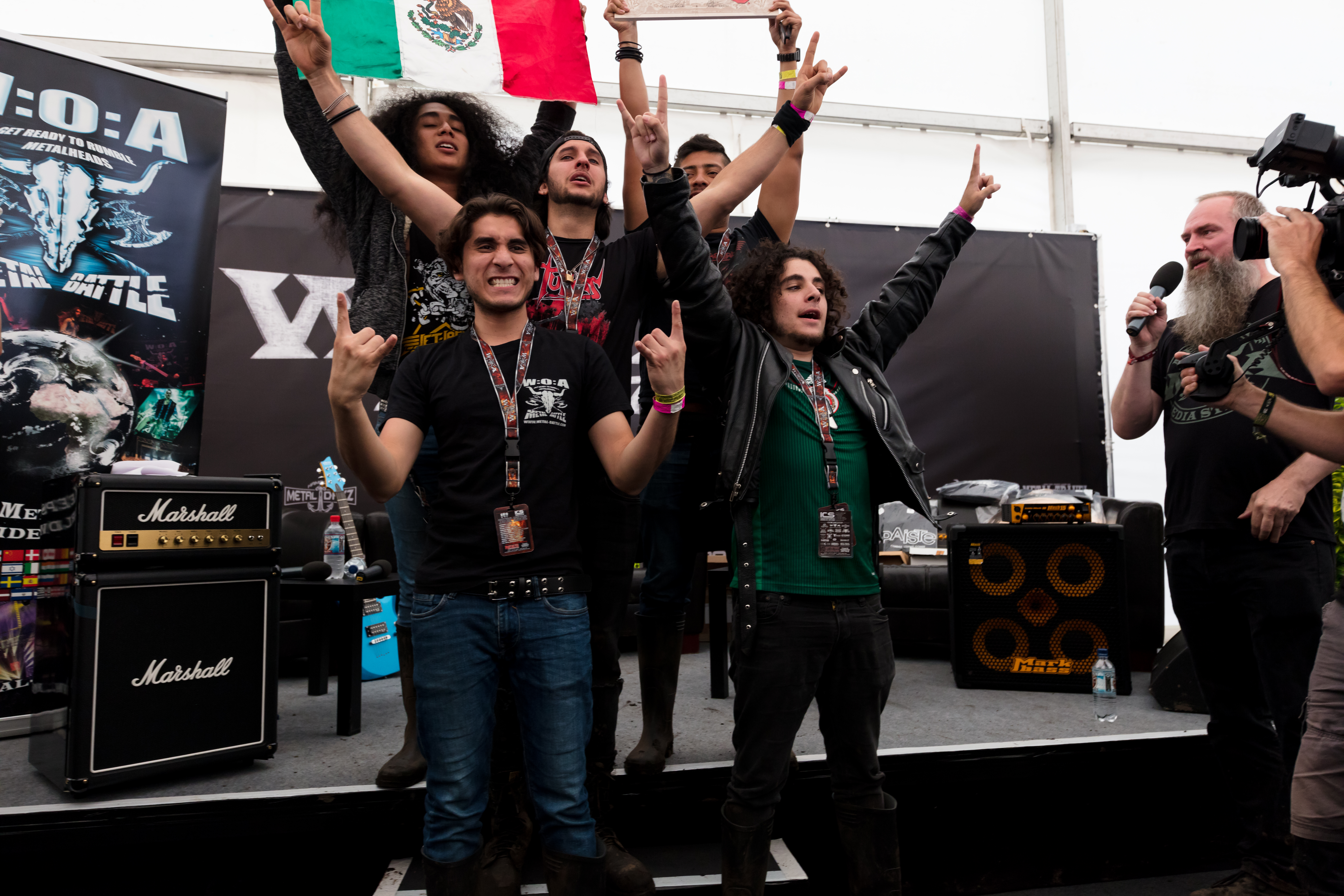 Metal Battle during Wacken Open Air at Schleswig-Holstein, Wacken, , Germany on 2017-08-04, Photo: Sven Mandel